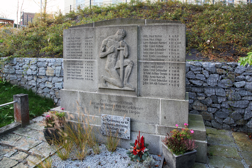 Das Kriegerdenkmal in Liegau-Augustusbad vor der Grundschule, restauriert 2013.